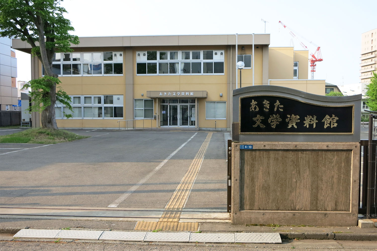 秋田県立図書館分館 あきた文学資料館（秋田市中通）。旧秋田県立秋田東高校（通信制、現秋田県立秋田明徳館高校の前身）の施設を再利用したものである。